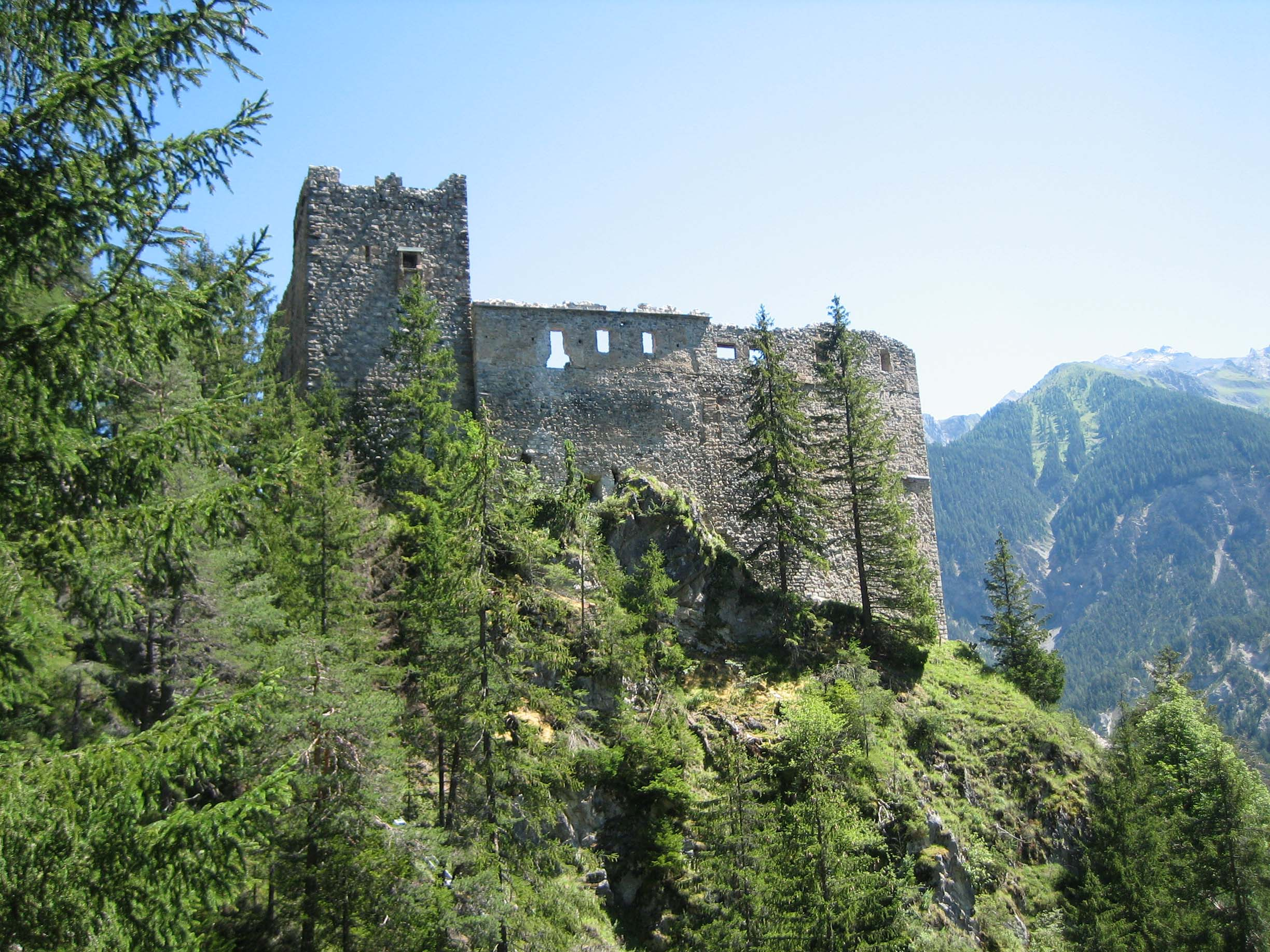 Ansicht von W